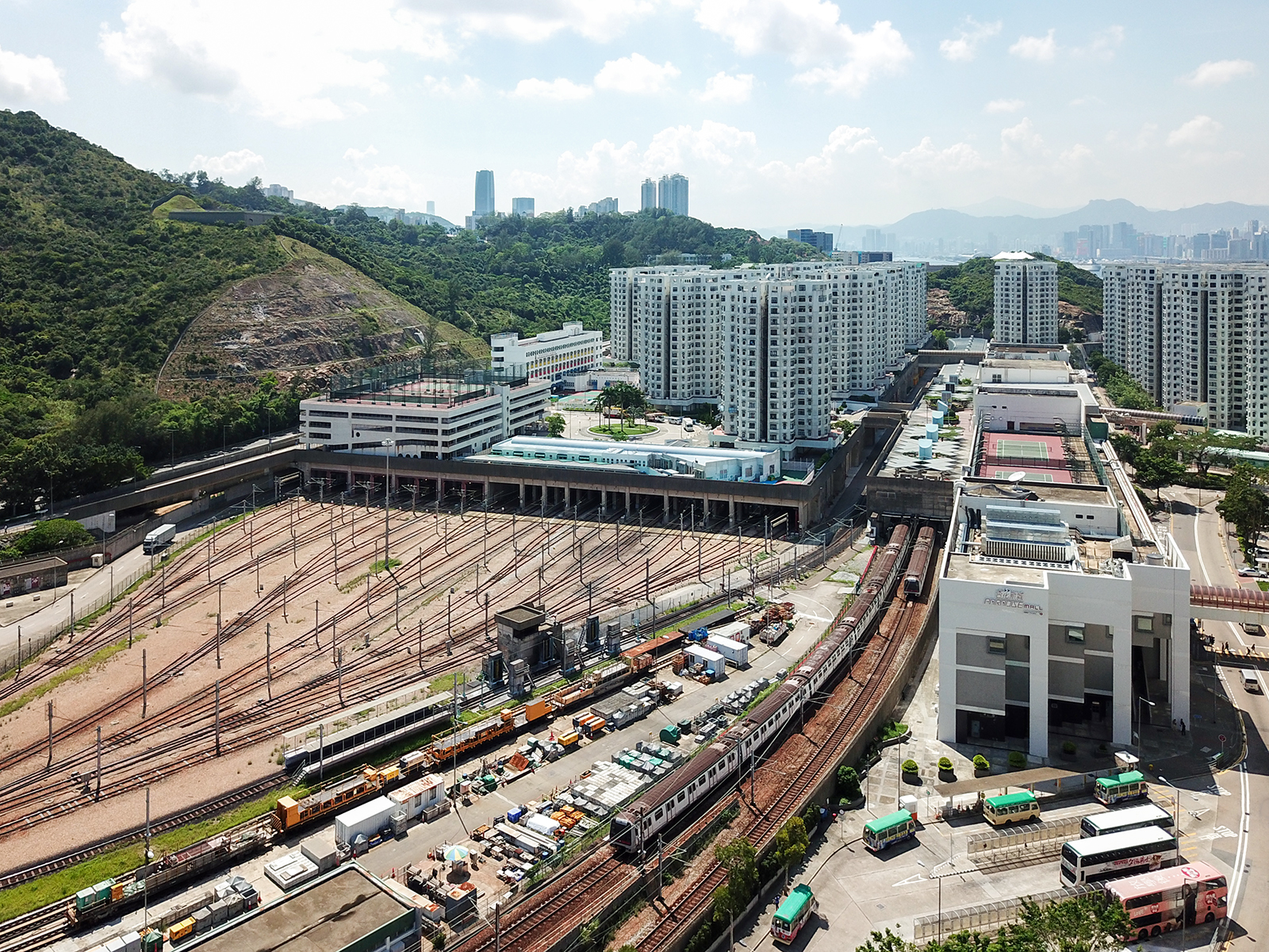 Chai Wan Depot